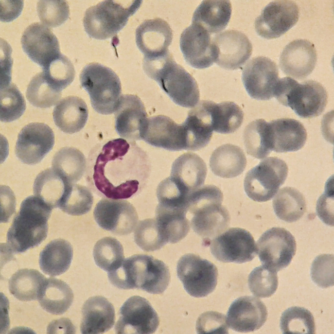 Stain: May-Grünwald-Giemsa.